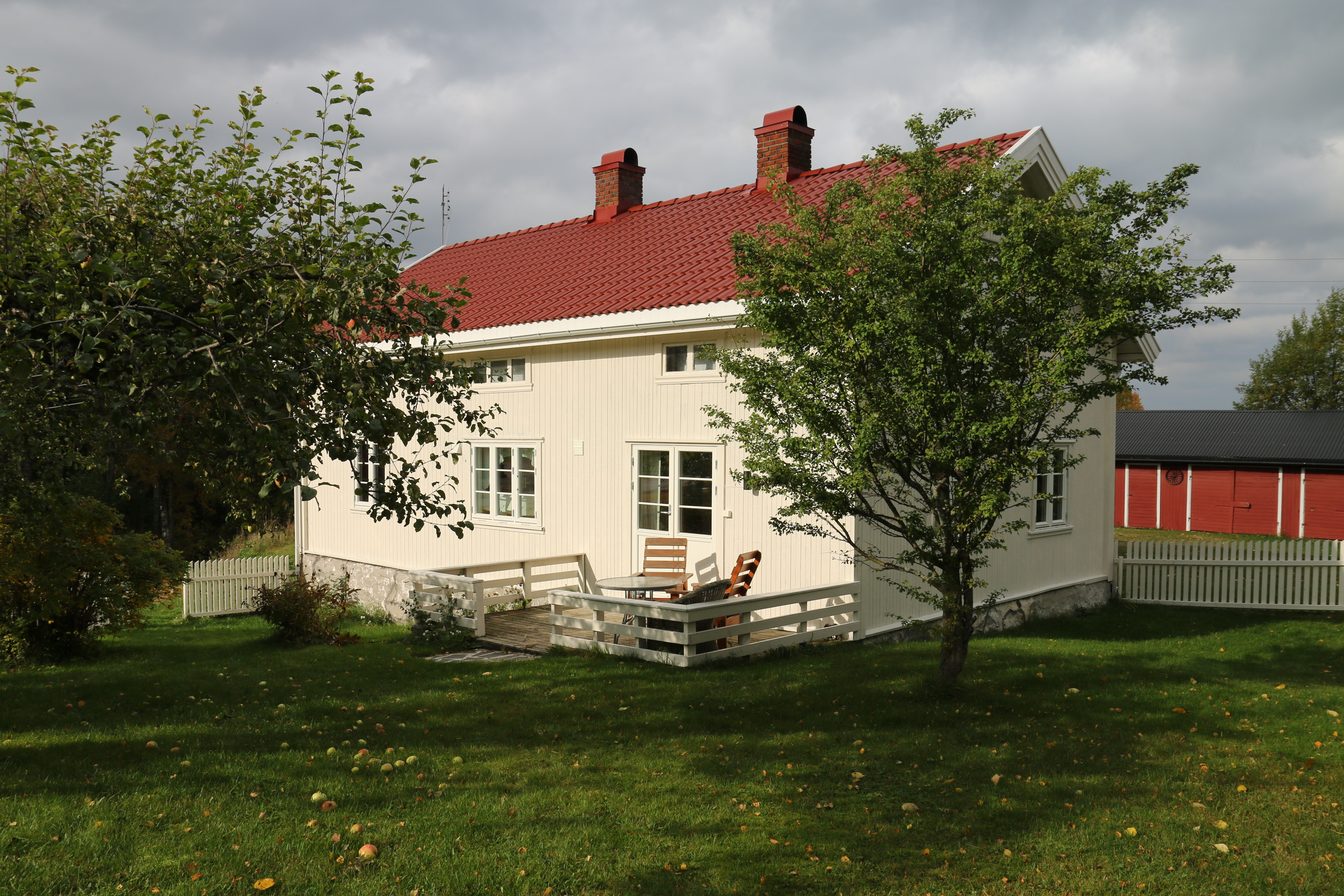 Våningshuset ved Grythengen på Toten, Oppland, Norway.